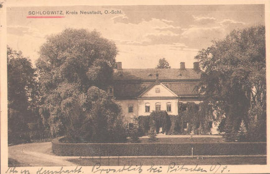 Dwór w Słokowie. Zespół pałacowy XVIII, XIX w.